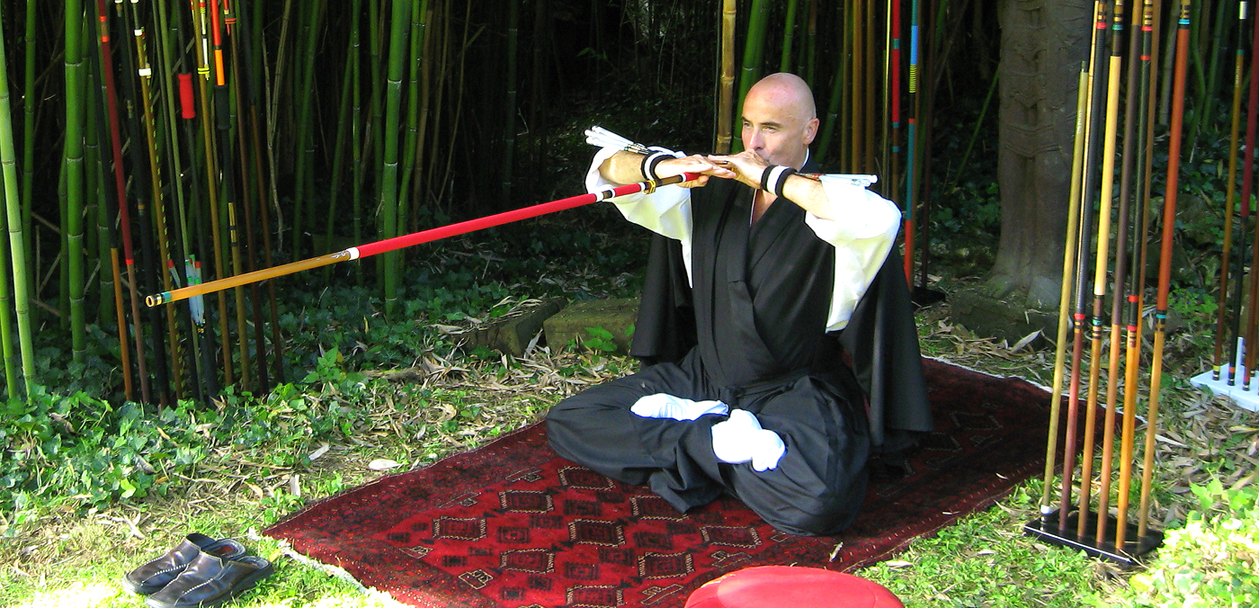 Michel-Laurent Dioptaz, Maître-fondateur de la Voie du Sarbacana